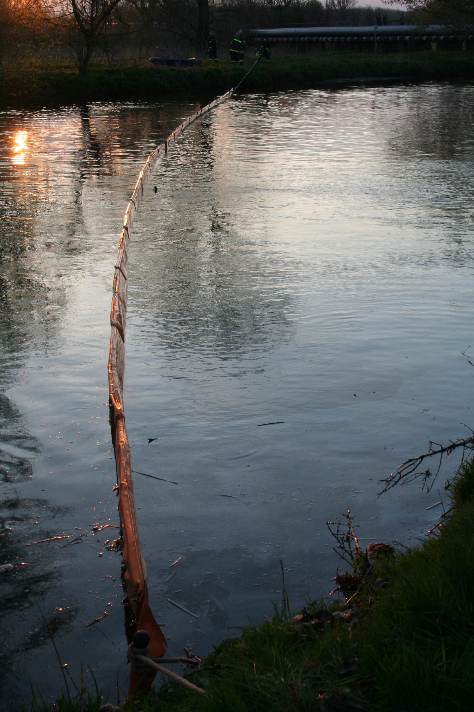 Oelwehr in Staßfurt